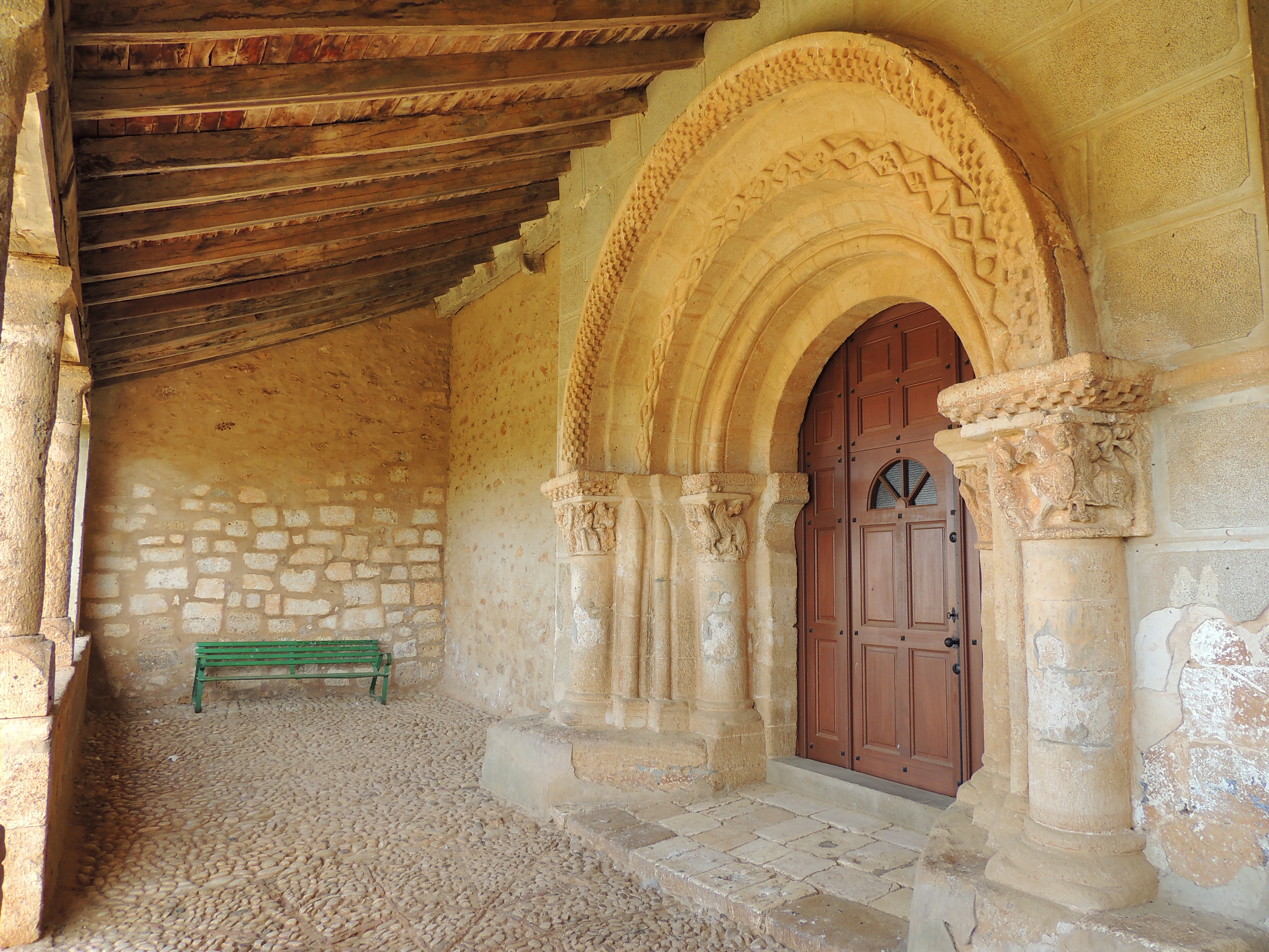 Portada de la iglesia de Santo Domingo de Silos en Torreandaluz (Soria).